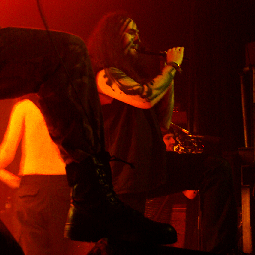 Waylander en concert au Cernunnos Pagan Fest 2008, organisé par les Acteurs de l'Ombre à la Locomotive, à Paris, le 20 Décembre 2008: Dave Briggs.